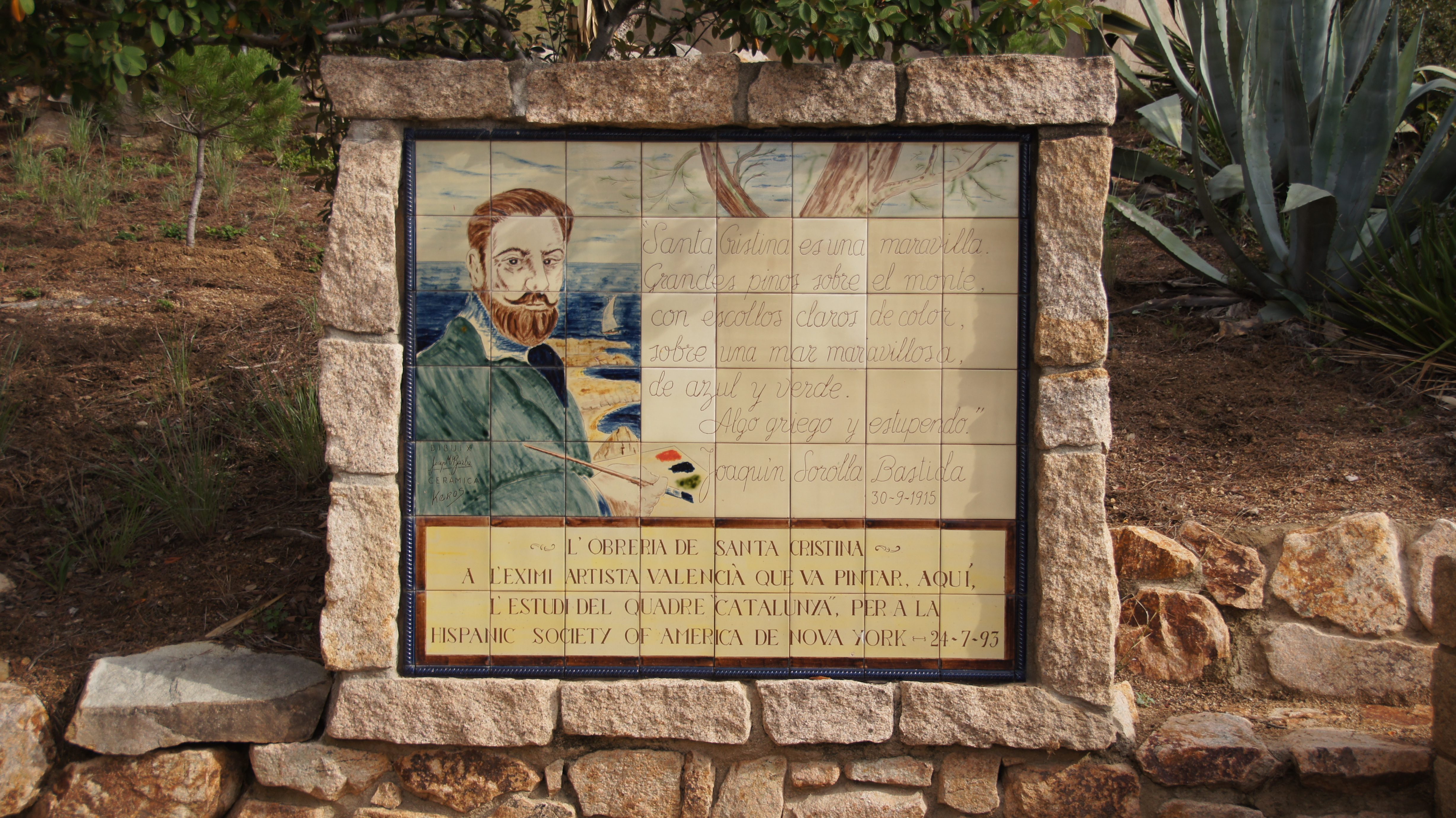 Lloret, Ermita de Santa Cristina, Bild Joaquín Sorolla